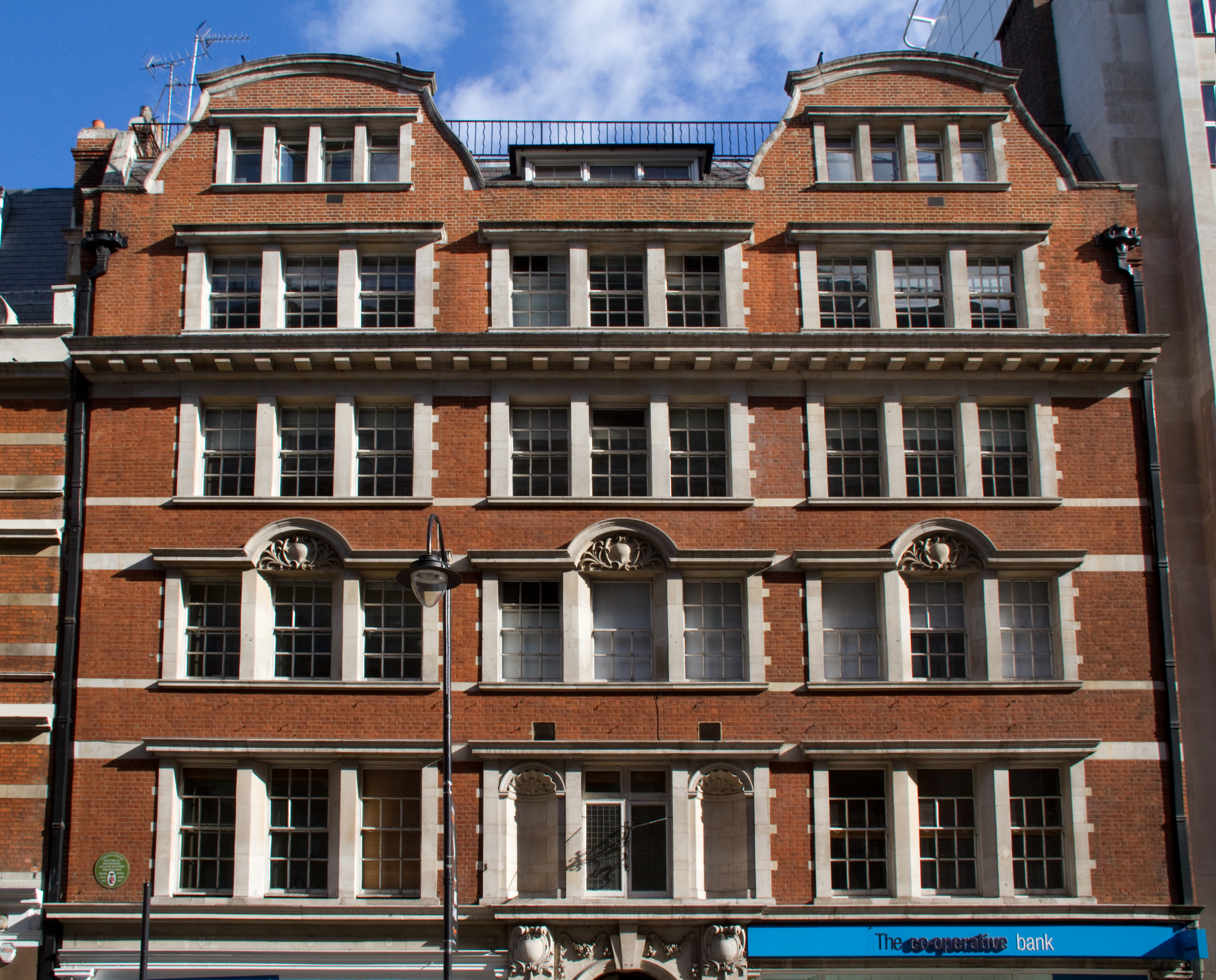 Faraday House